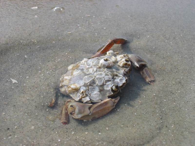 Krabbe an der Nordsee